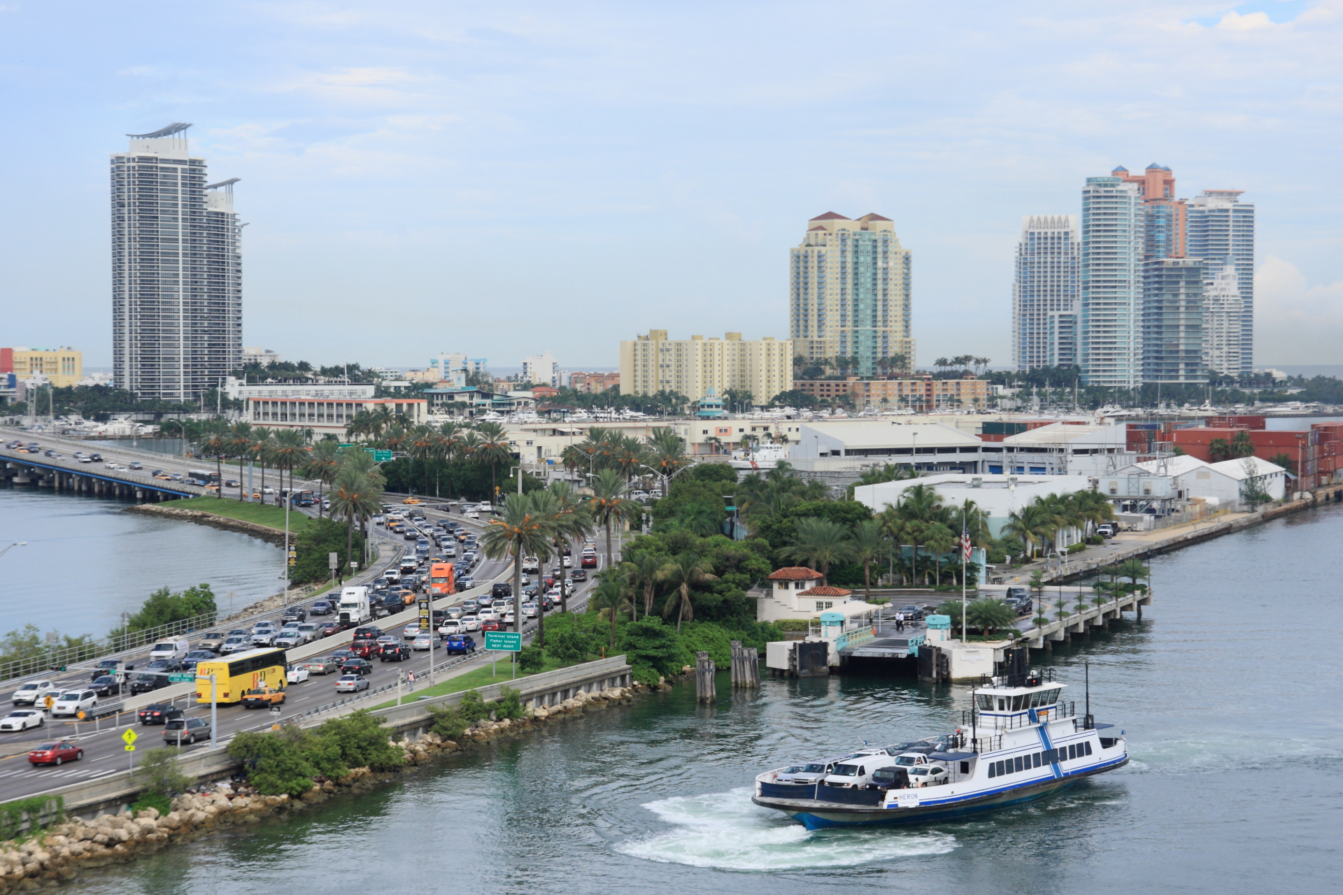 IMG_5511-web